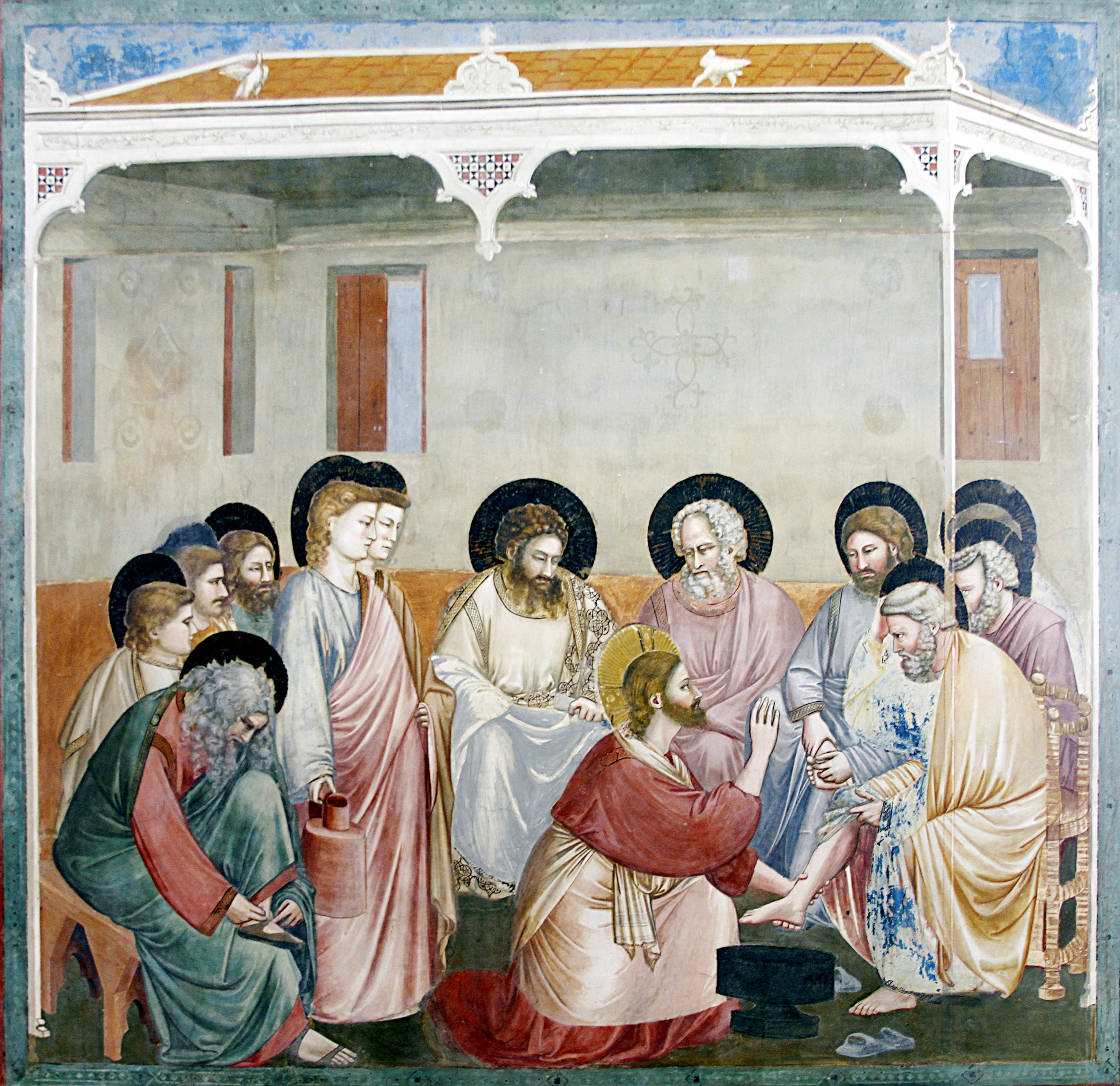 Capella dei Scrovegni - Padua